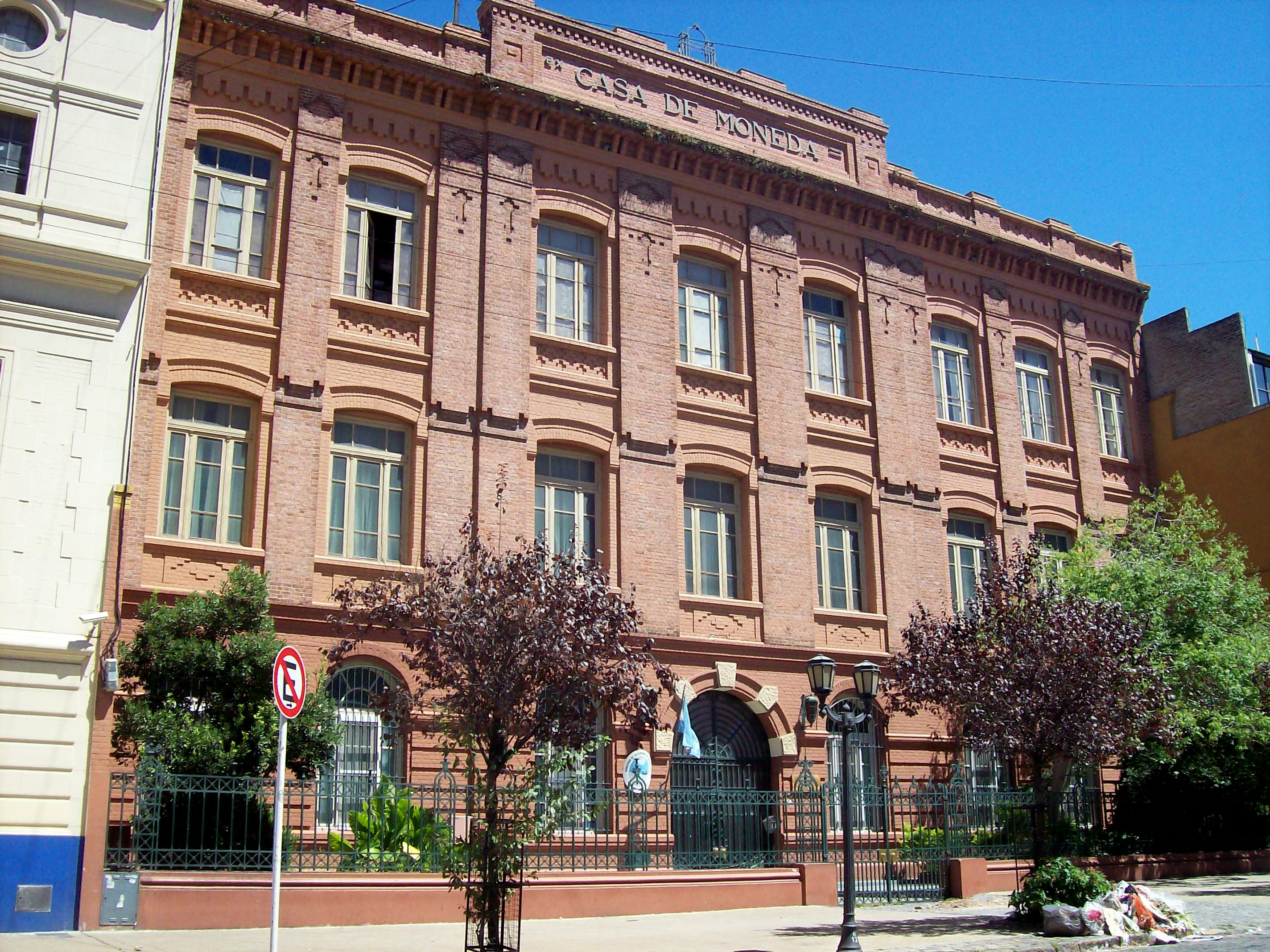 Ex Anexo de la Casa de Moneda, sobre calle Balcarce, barrio de Monserrat, Buenos Aires, Argentina.